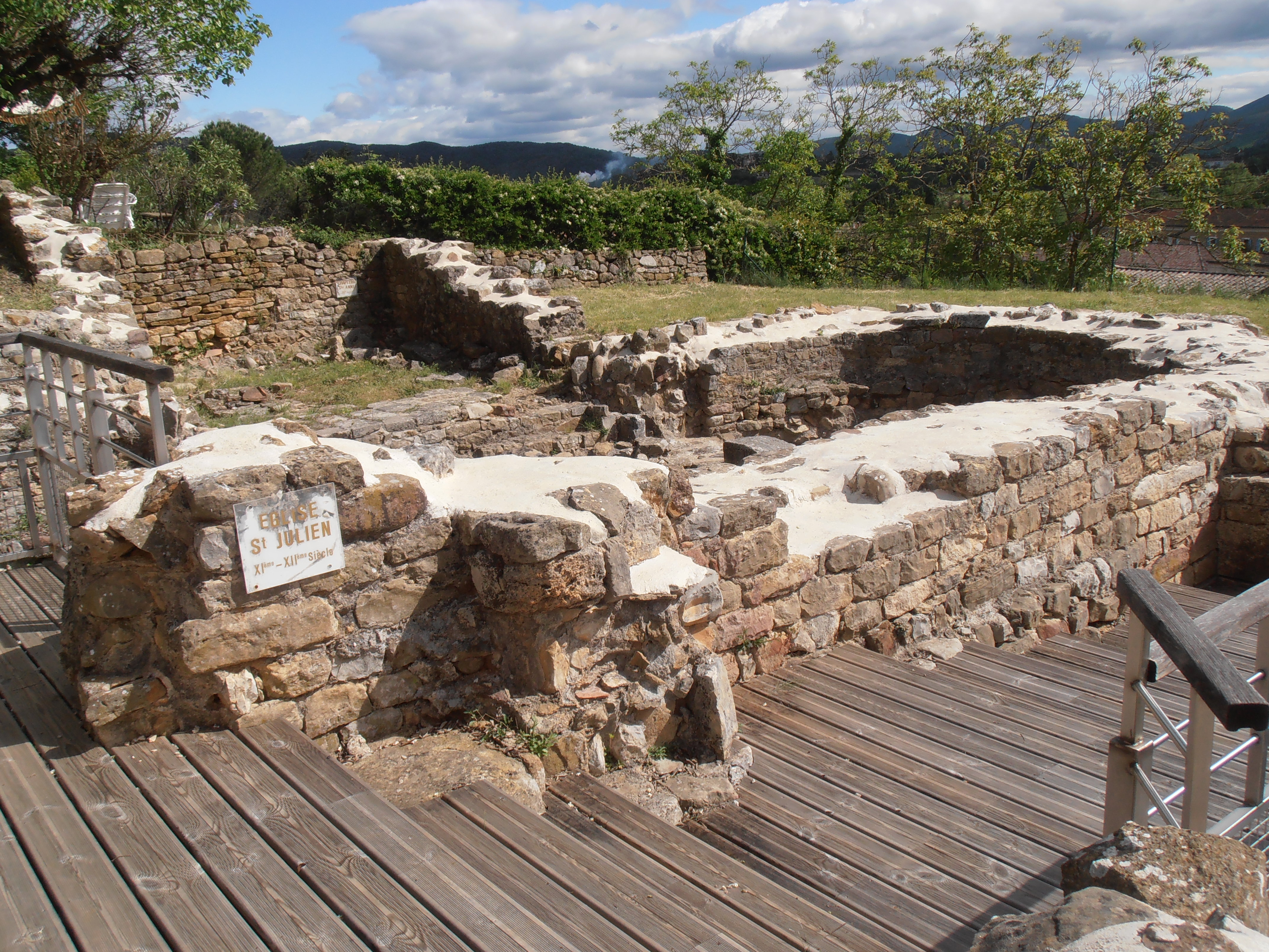 Ardèche, Salavas, Ruines de la Glaizasse : églises Saint-Jean et Saint Julien et chapelle Sainte Anne, disparues. Une partie du mobilier dégagé lors des fouilles archéologiques (dont 250 sépultures du Ve au XIXe siècle), est exposée dans la salle basse de l’enceinte du château de Salavas.